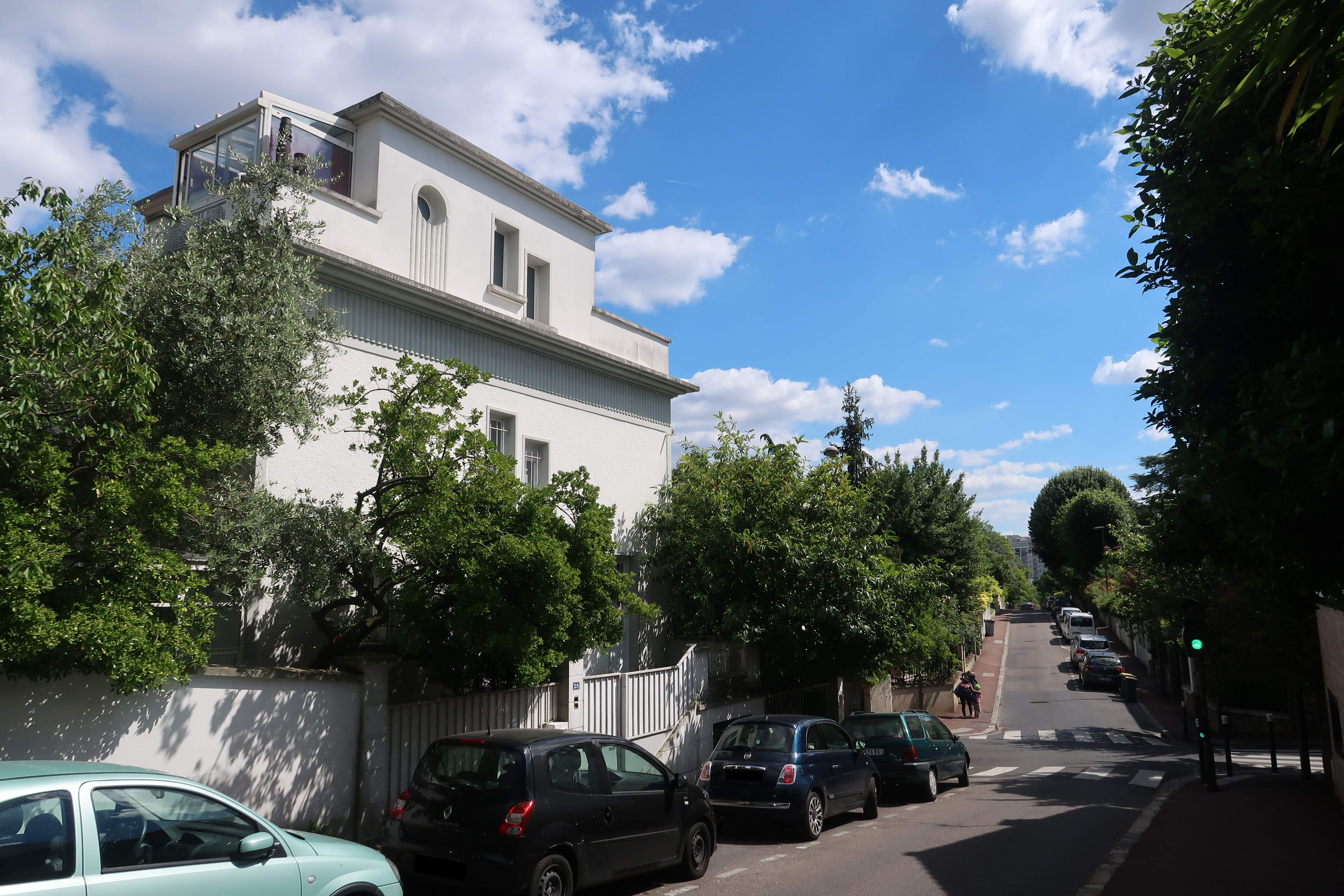 Maison avenue de la Criolla à Suresnes (Hauts-de-Seine).